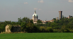 Lonato (Italia).